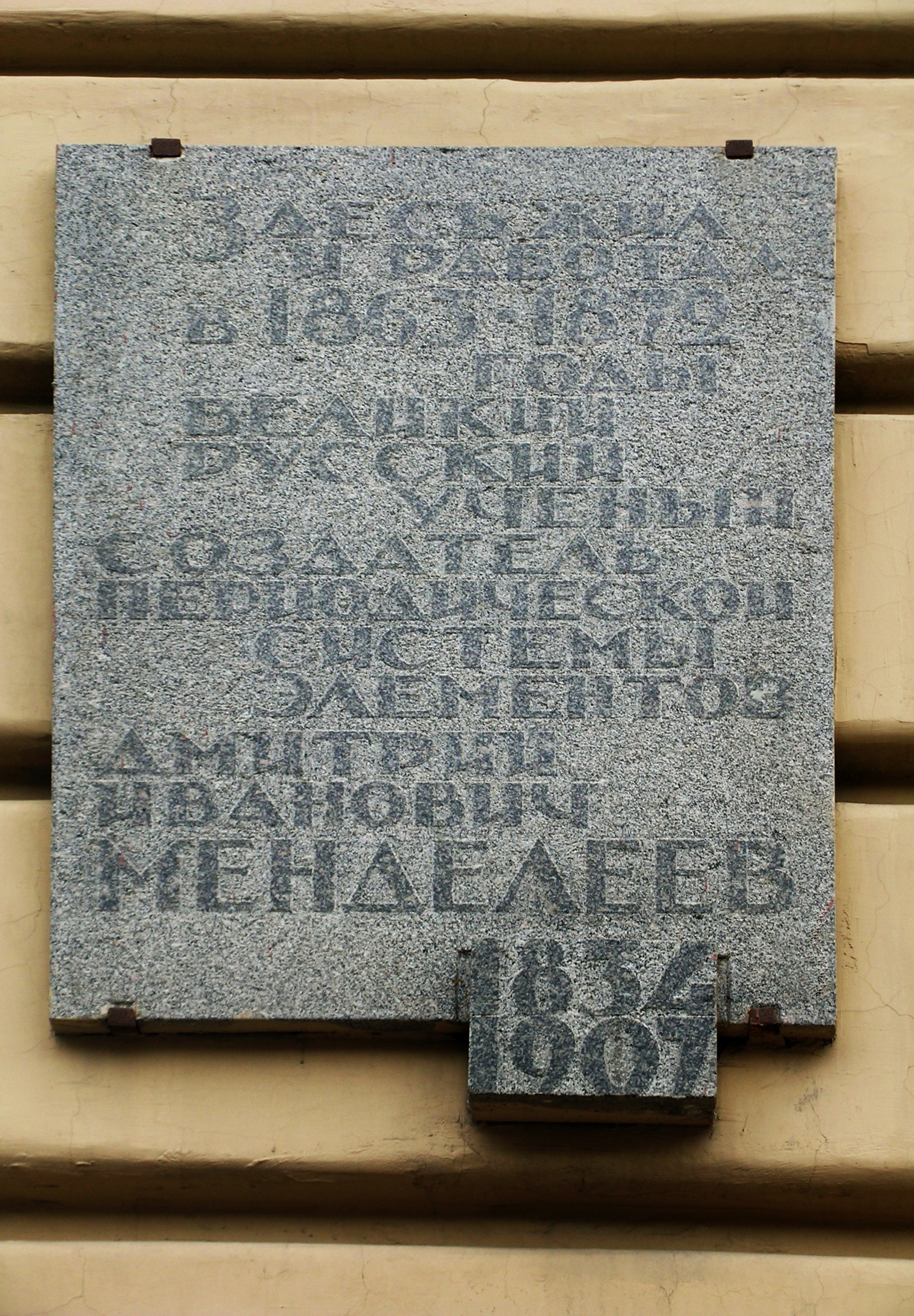 Здесь жил и работал 1863—1872 годы великий русский учёный, создатель периодической системы элементов Дмитрий Иванович Менделеев. 1834—1907.